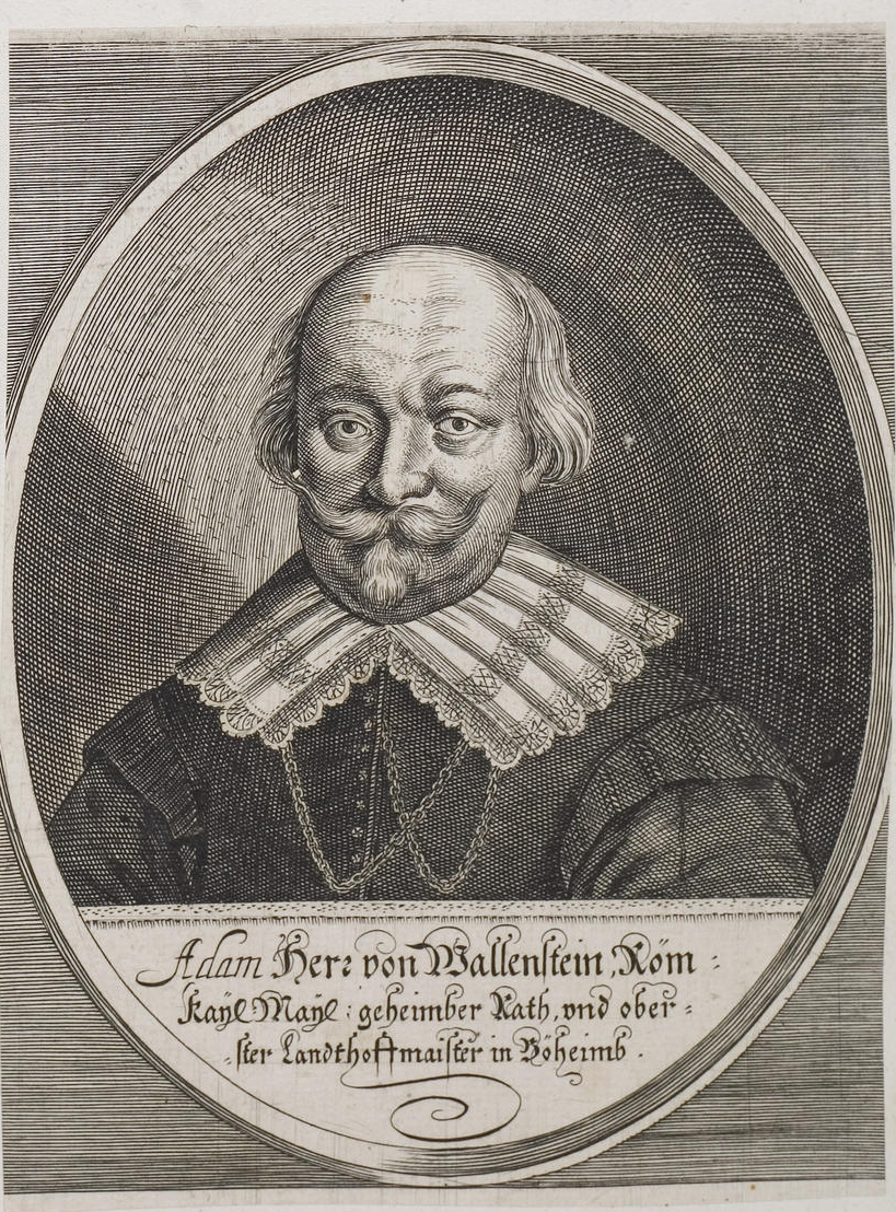 Grafik aus dem Klebeband Nr. 2 der Fürstlich Waldeckschen Hofbibliothek Arolsen Motiv: Adam von Waldstein (Wallenstein) (1569–1638), Böhm. Hofbeamter in Prag